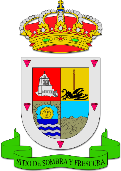 Tijarafe ostenta un escudo cuartelado. Primero, de gules, balconcillo de plata. Segundo, de oro, dragón o diablo alado de sable, de perfil y echado, sobre le que se alza una candela de gules. Tercero, cueva al natural sobre ondas de azur y plata, enmarcando un sol de oro en campo de azur. Cuarto, de azur, peñasco o risco al natural. Bordura de plata, con cinco embudos de gules. Al timbre, corona real cerrada. Bajo la punta, cinta de sinople con la divisa “Sitio de sombra y frescura” en letras de sable.